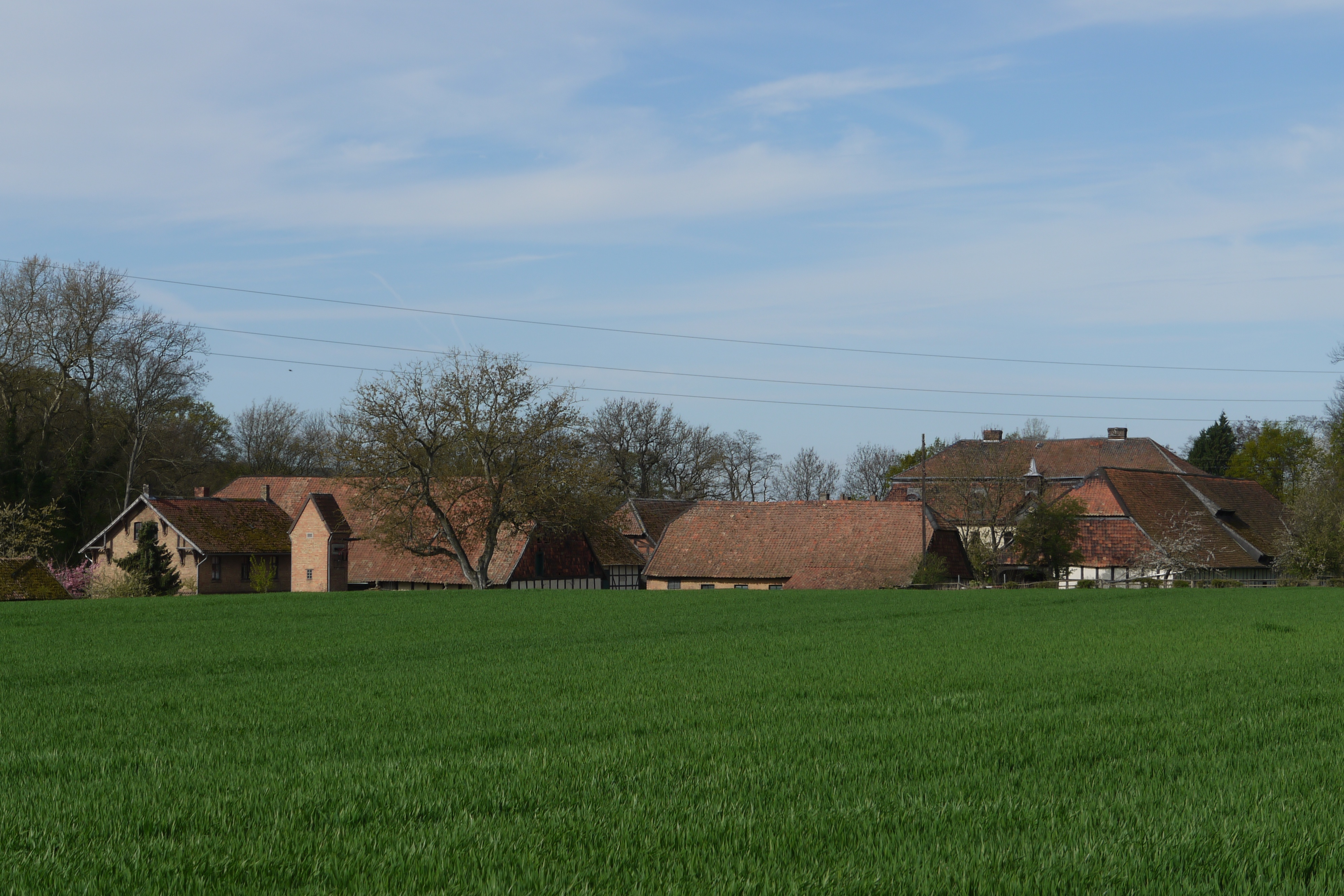 Gut Nienrode bei Salzgitter-Ohlendorf - Ansicht von Nordosten von der K28 (Gielder Staaße)